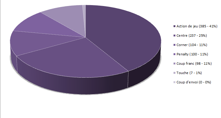 Statistiques illustrant le nombre de buts par action de jeu durant la saison 2011-2012 de championnat de football de Ligue 1.